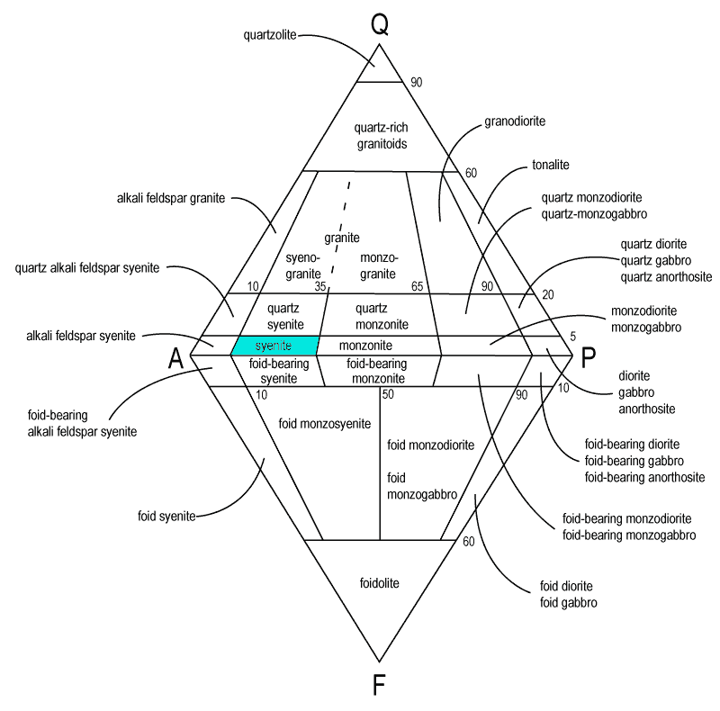 Sienitaren kokapena QAPF diagrama batean.